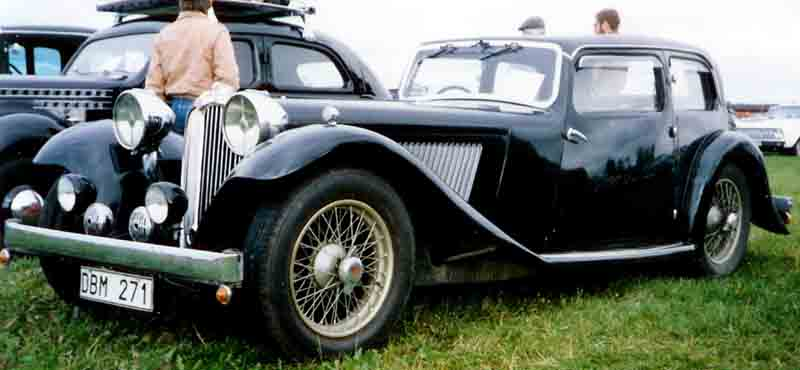 SS I 16 HP Saloon 1934